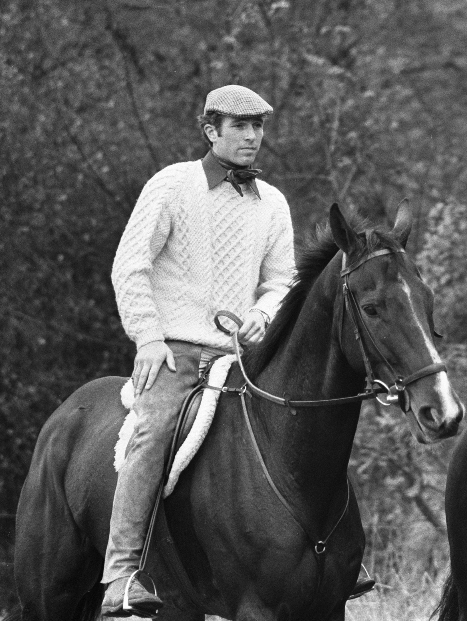 Prinses Anne van Engeland en haar verloofde Mark Philips in Nederland